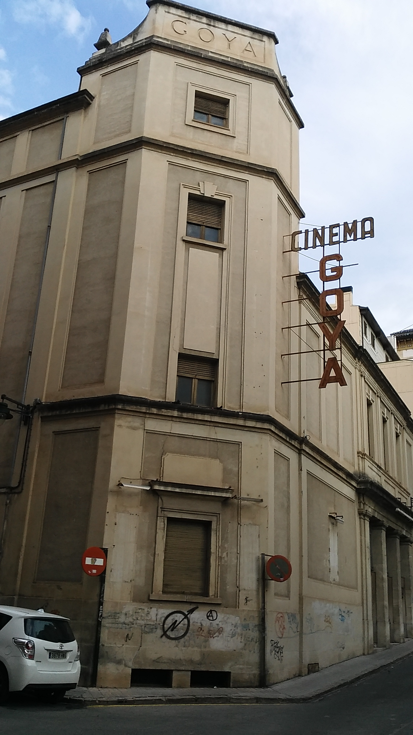 Frontera de l'edifici del cine Goya, en Alcoy (Alacant).